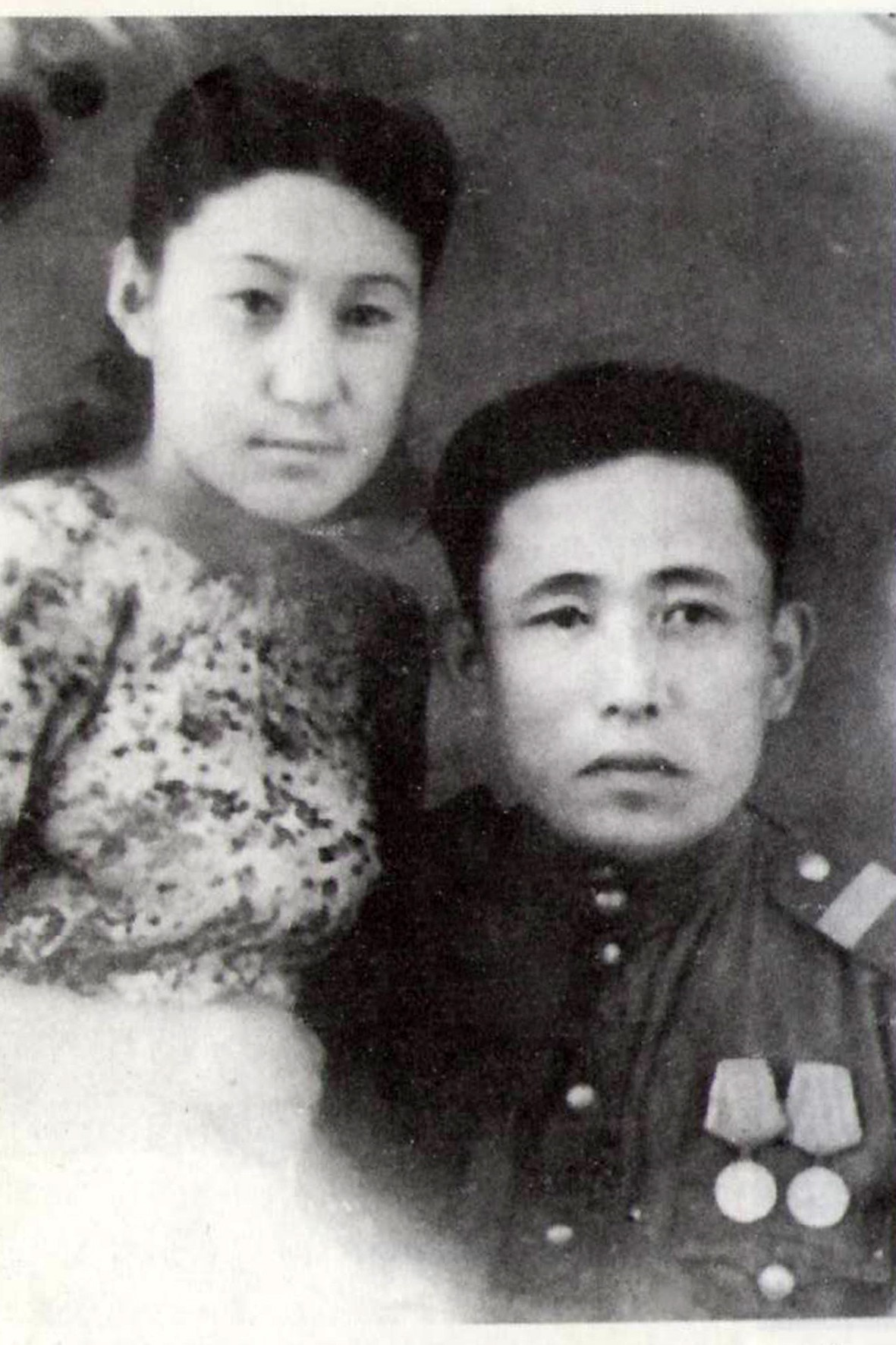 Супруг Рыскуловой Какши